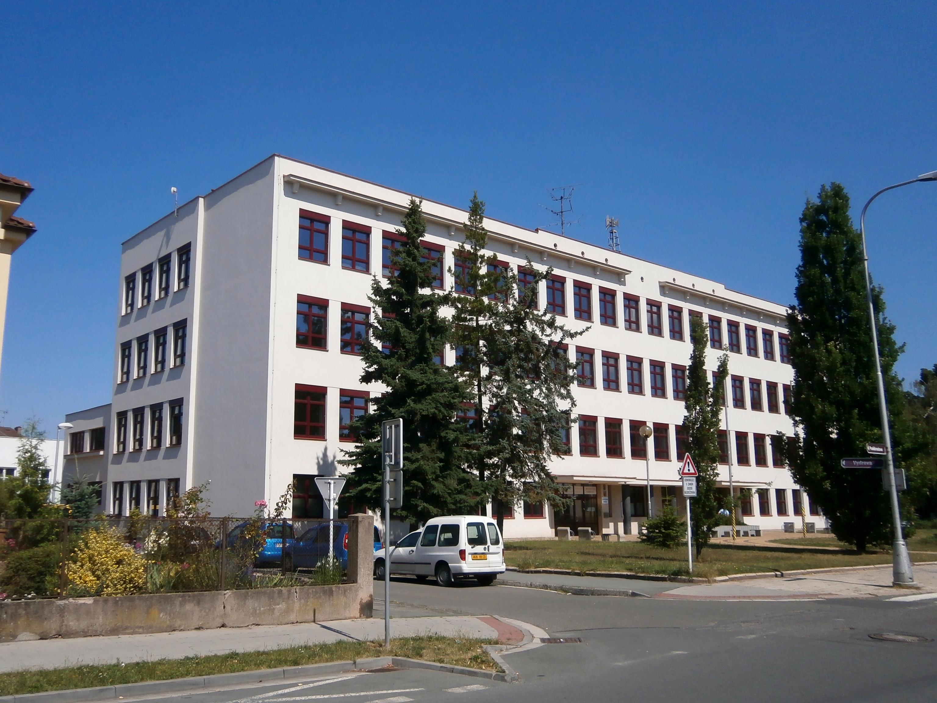 ZŠ Jiráskovo náměstí (Hradec Králové)